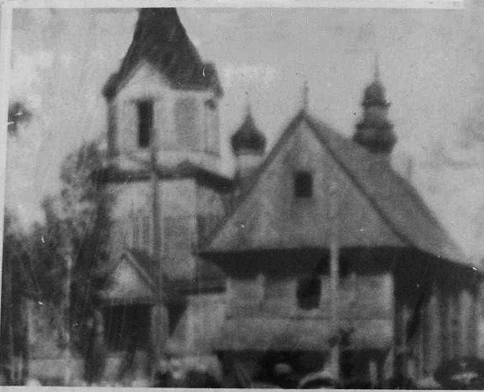 Беларуская (тарашкевіца): Пажэжын (Pažežyn). Старая царква і новая